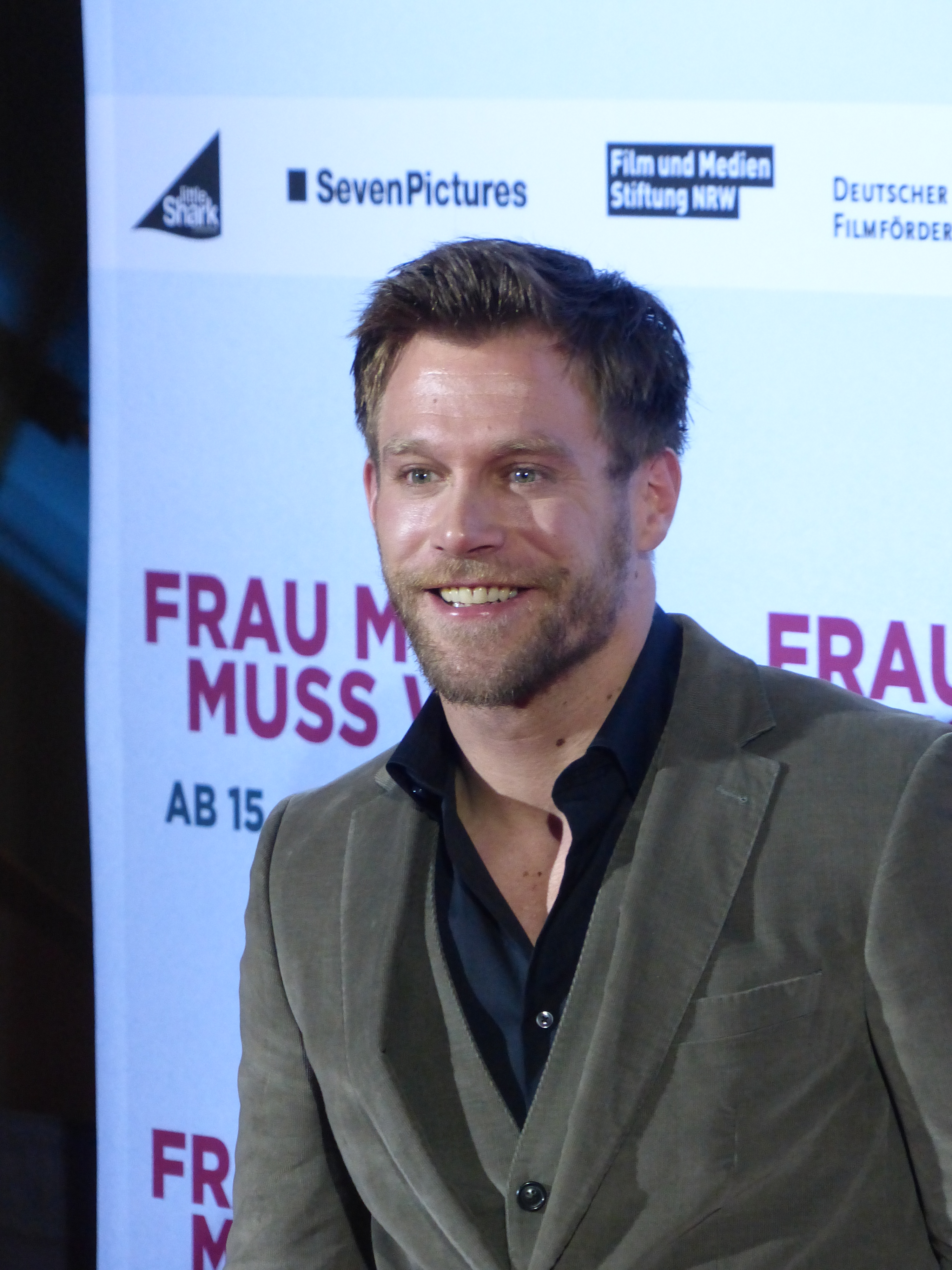 Ken Duken bei der Kinopremiere von "Frau Müller muss weg", Januar 2015, Cinedom Köln